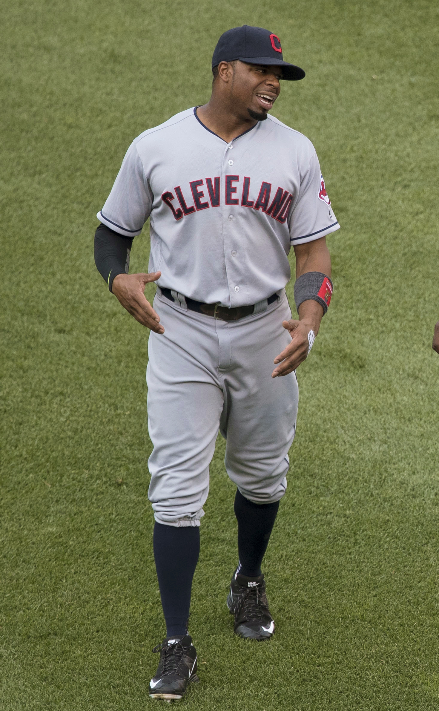 Rajai Davis